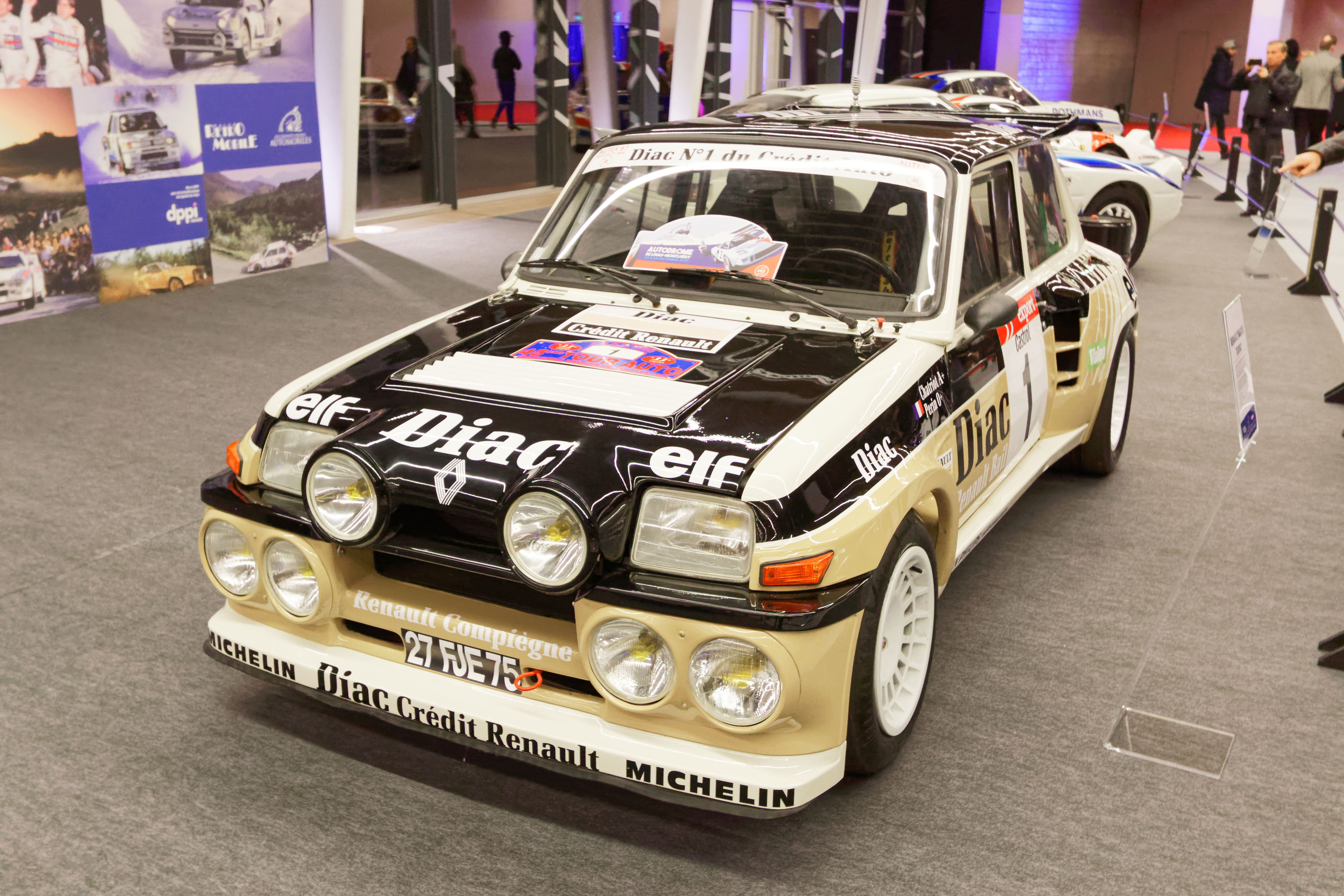 Une Renault Maxi 5 Turbo de 1985 (?) exposée lors du salon Rétromobile 2017.